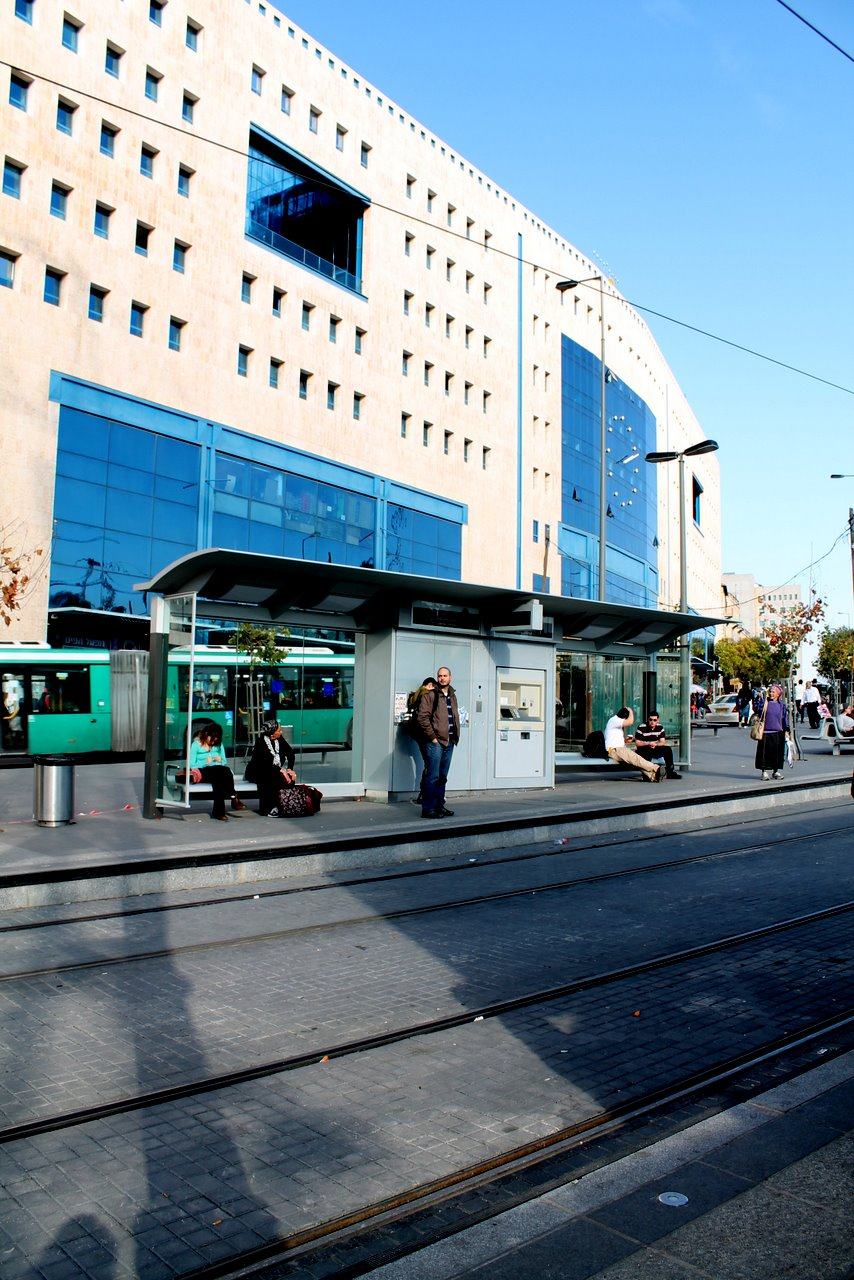 תחנה מרכזית